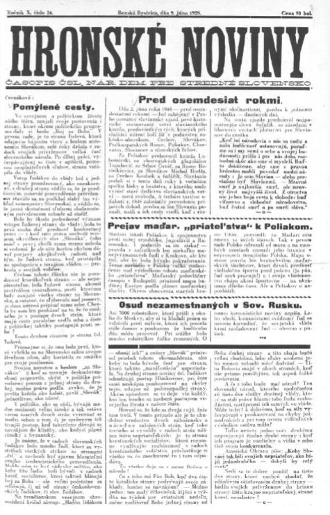 Titulný list týždenníka Hronské noviny.